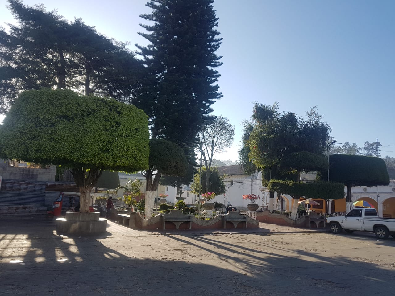 visita al parque Central del municipio de Malacatancito, febrero 2019